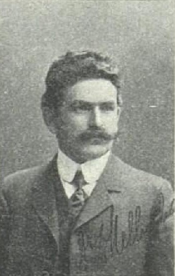 Ladislav Melhuba (1873-1918), rakouský a český lékař a politik